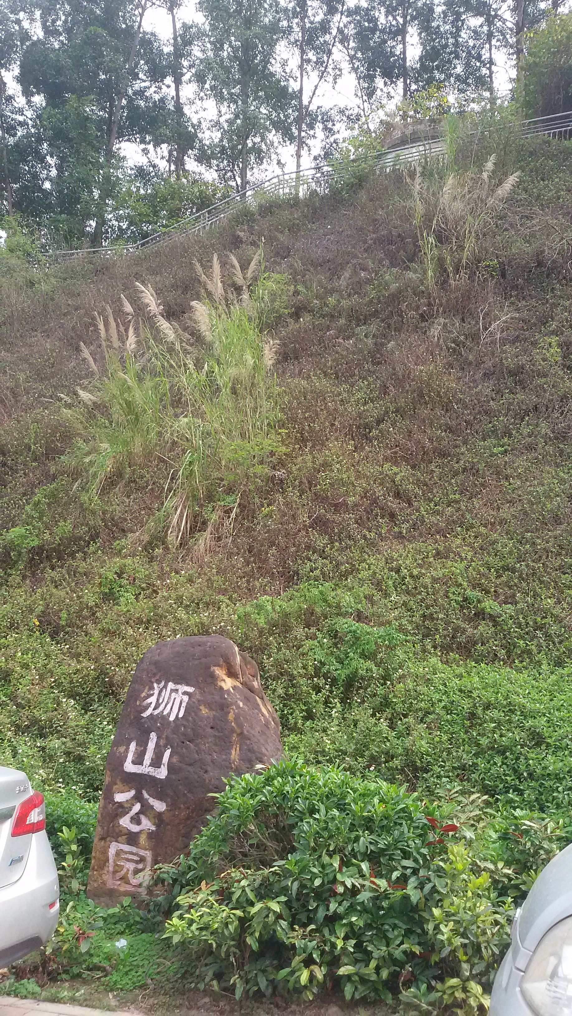 粵語: 喺黃埔區嘅獅山公園